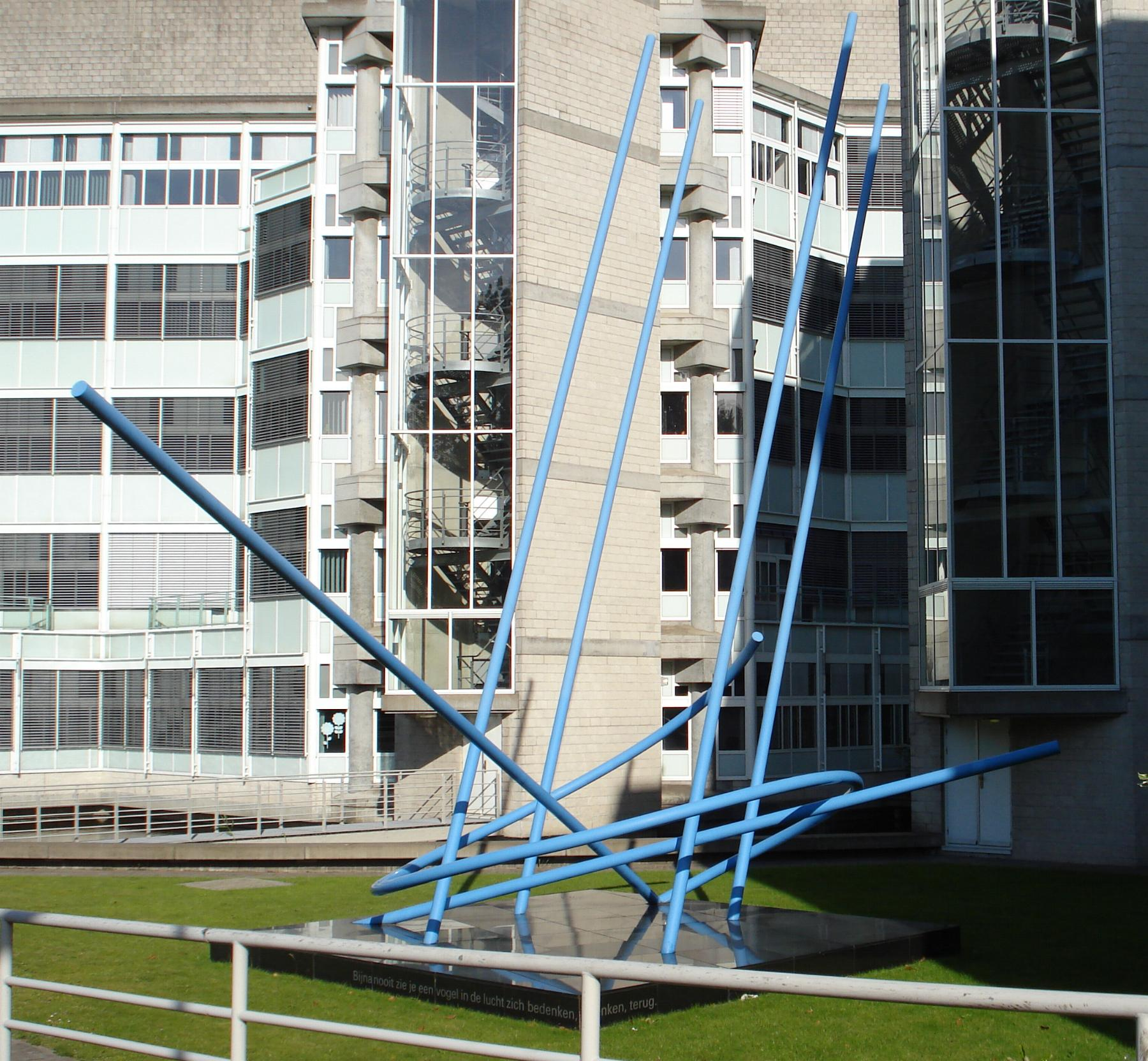 Den Haag, Schenkkade. "Monument van de menselijke vergissing" van Marijke de Goey. The Hague/The Netherlands